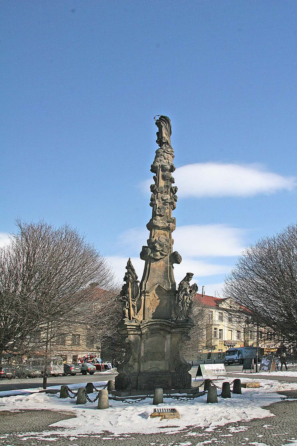 Česky: Choceň, náměstí Tyršovo, mariánský sloup. - OpenStreetMap(Info)